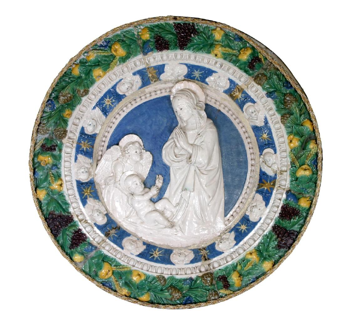 Tondo atribuido al taller de los Buglioni (1501-1533) Cerámica esmaltada italiana (Mayólica) Museo Cerralbo España.